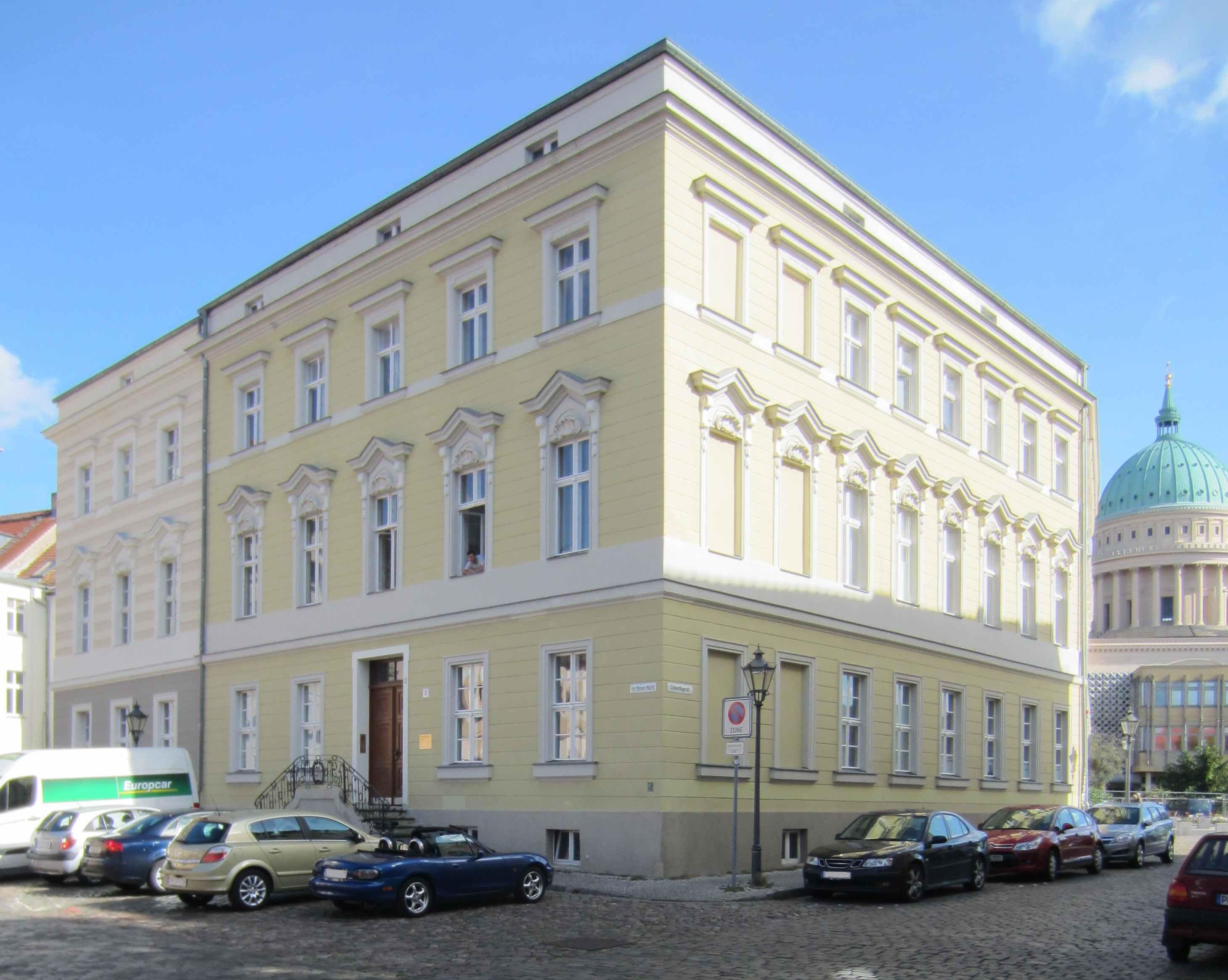 Bürgerhaus in Potsdam, Am Neuen Markt 2